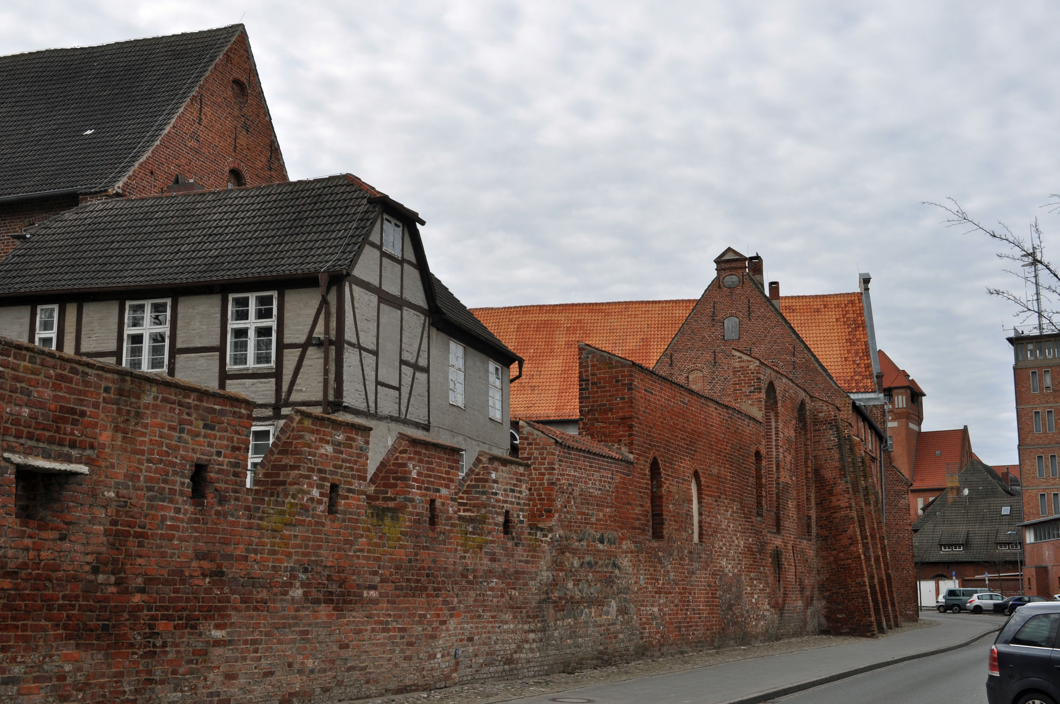 Gebäude bzw. Gebäudedetail in Stralsund. Straße und Hausnummer siehe Dateiname.